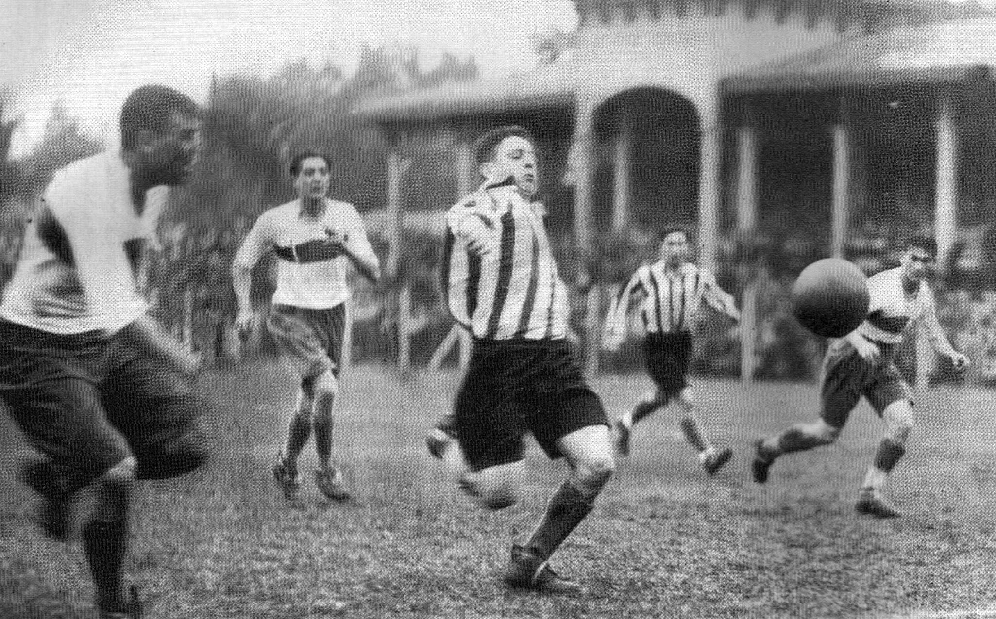 Una escena del clásico platense disputado por la segunda rueda del Campeonato de 1931. En la imagen, Alejandro Scopelli intenta rematar ante la marca de Salvador Fernández. De fondo, la vieja platea techada del estadio de Estudiantes de La Plata.